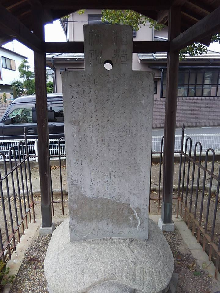 清酒発祥の地とされる伊丹市鴻池の児童公園に建っている石碑